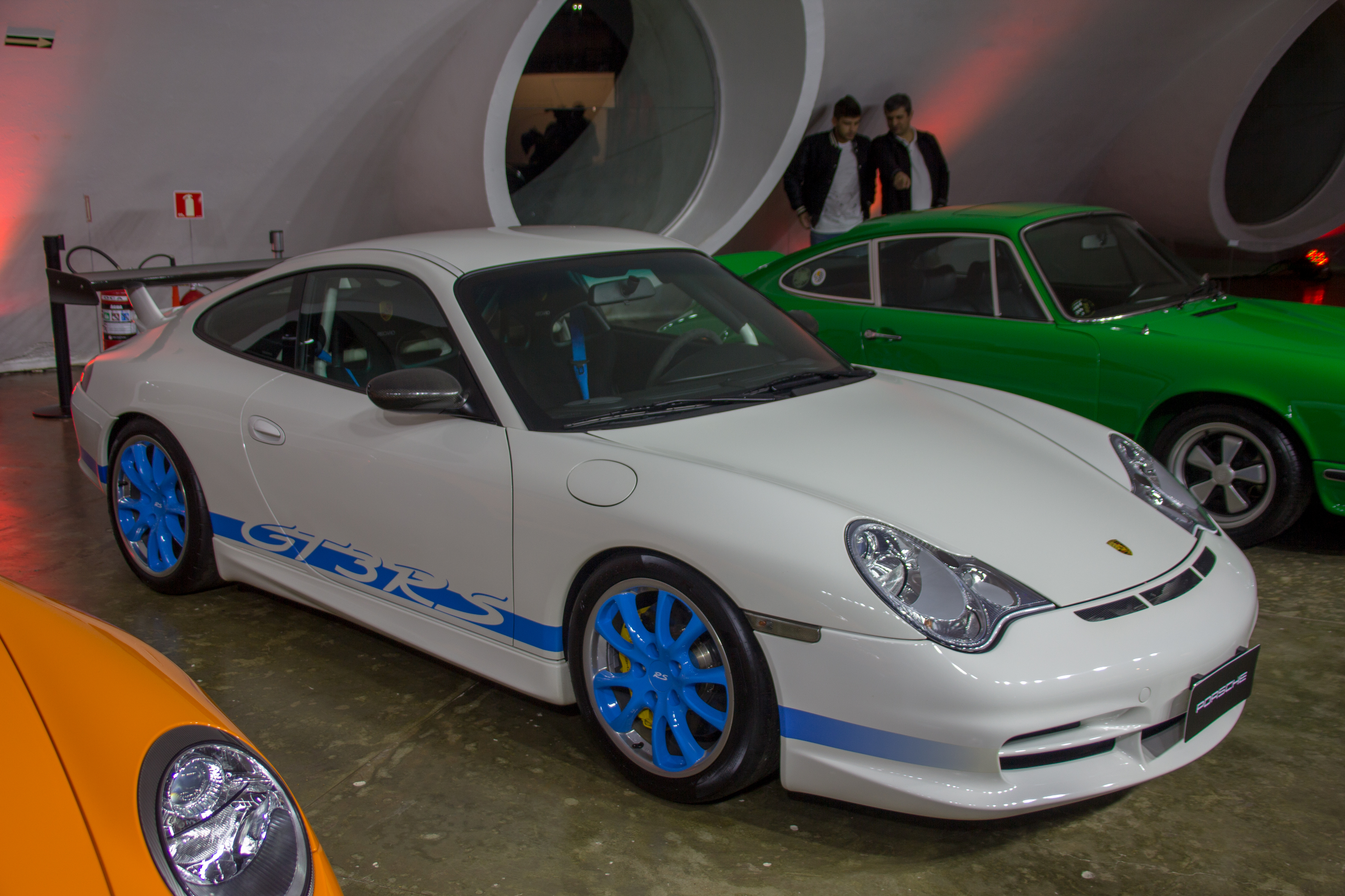 Porsche exhibition at Oca, Parque do Ibirapuera, São Paulo, Brazil Porsche 911 GT3 RS (2004)